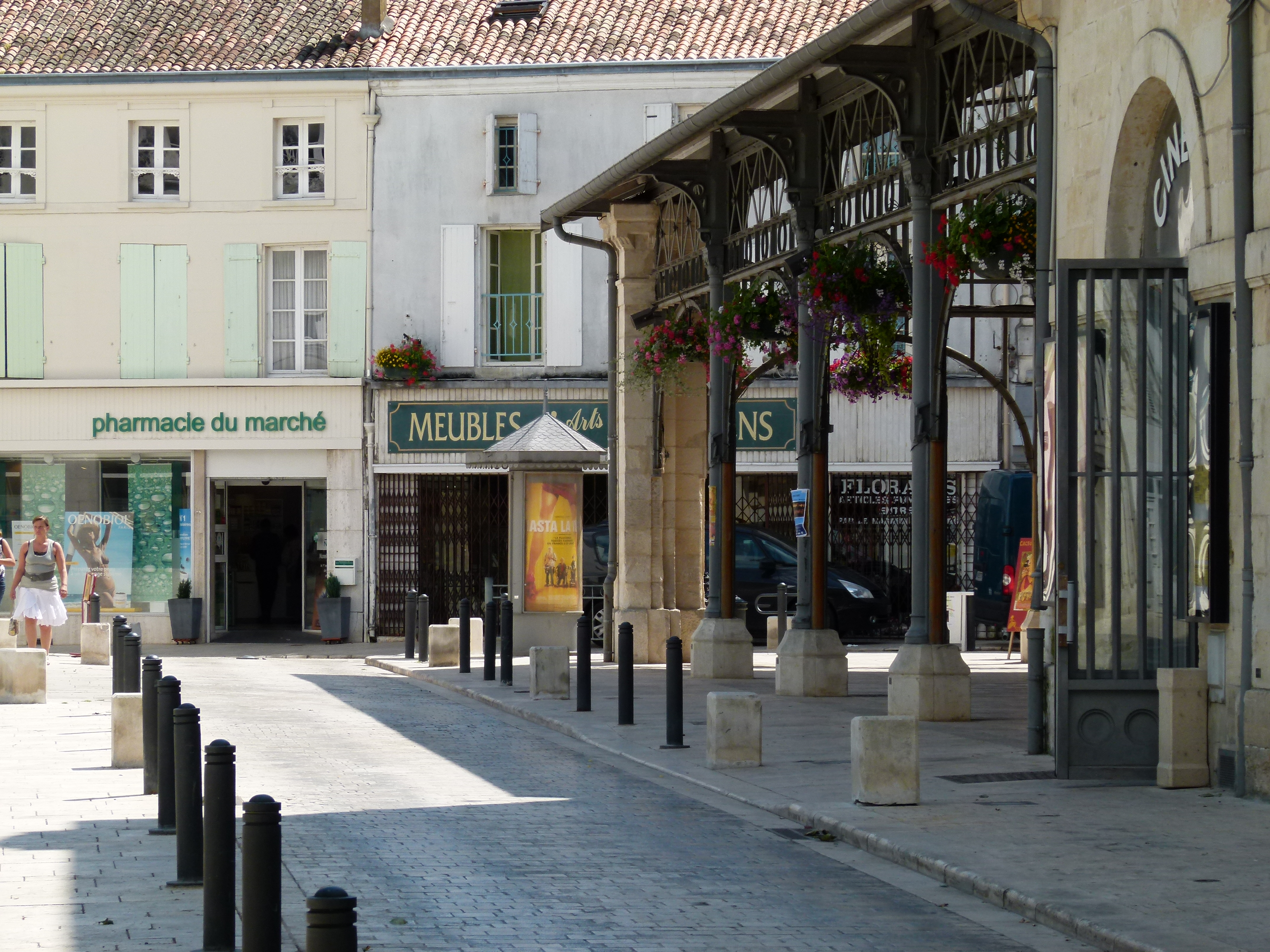 Les Halles de Surgères donnent sur une jolie place au début du XXIe siècle à partir de 2001.